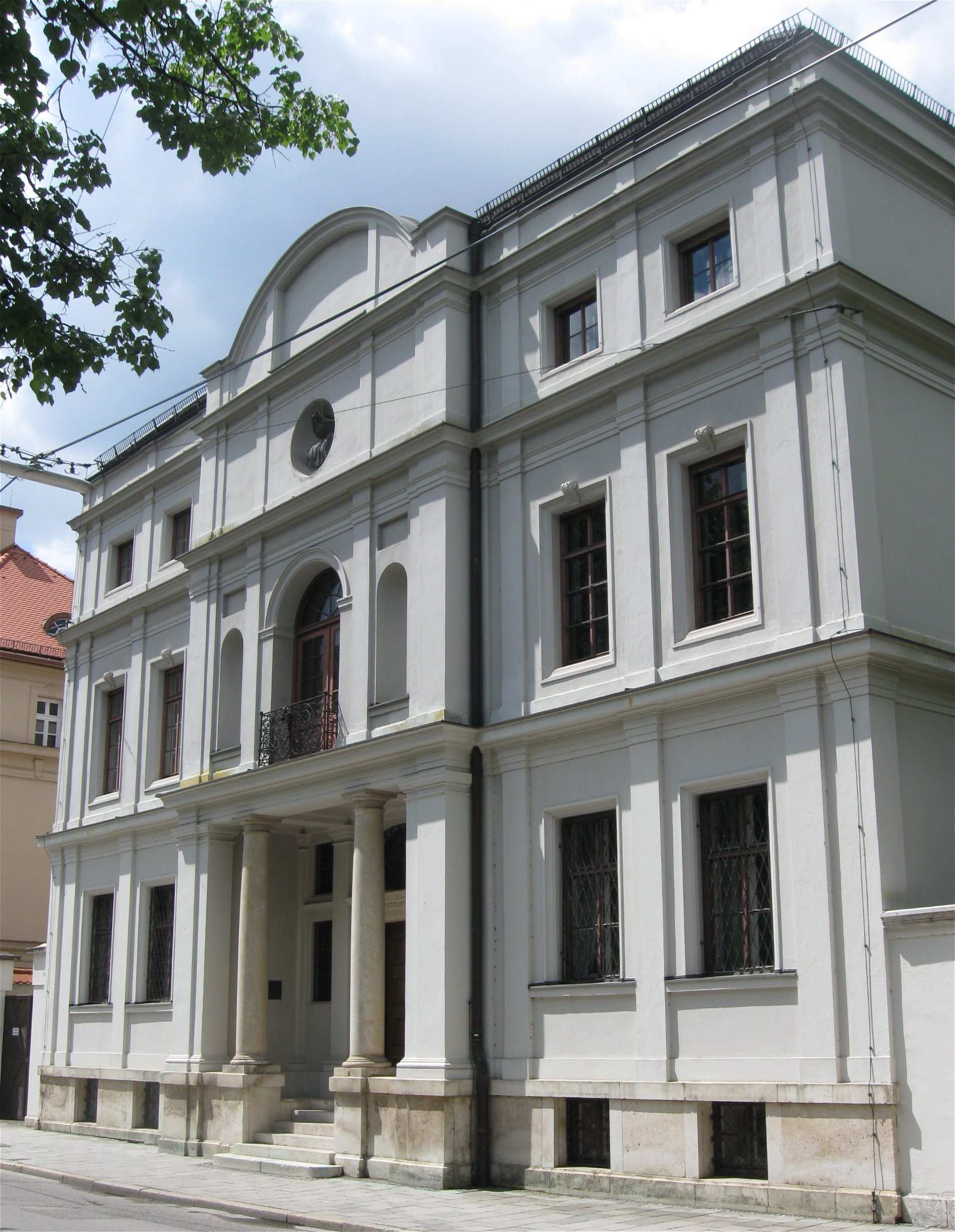 Kaulbachstraße 15; Kaulbachstraße 15a. Ehem. Villa des Malers Friedrich August von Kaulbach, heute Historisches Kolleg im Stifterverband für die Deutsche Wissenschaft, dreigeschossiger Bau mit Mittelrisalit, seitlichen Kastenerkern und rückseitigen Risaliten, im Stil italienischer Renaissancevillen, von Gabriel von Seidl, 1887-89, Erhöhung der Rückflügel, 1900; westlich gestalteter Garten.